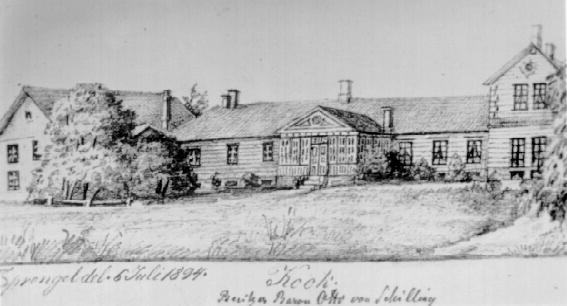 Koogu mõis